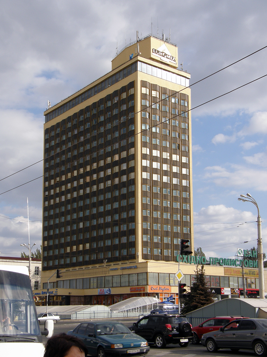 угол Советской и Оборонной